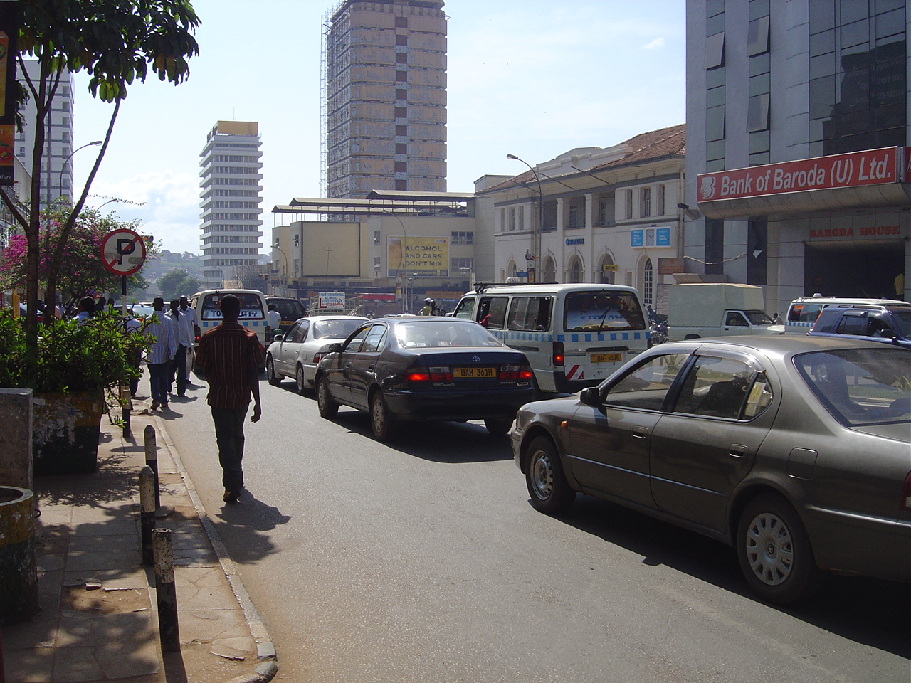 Kampala street scene